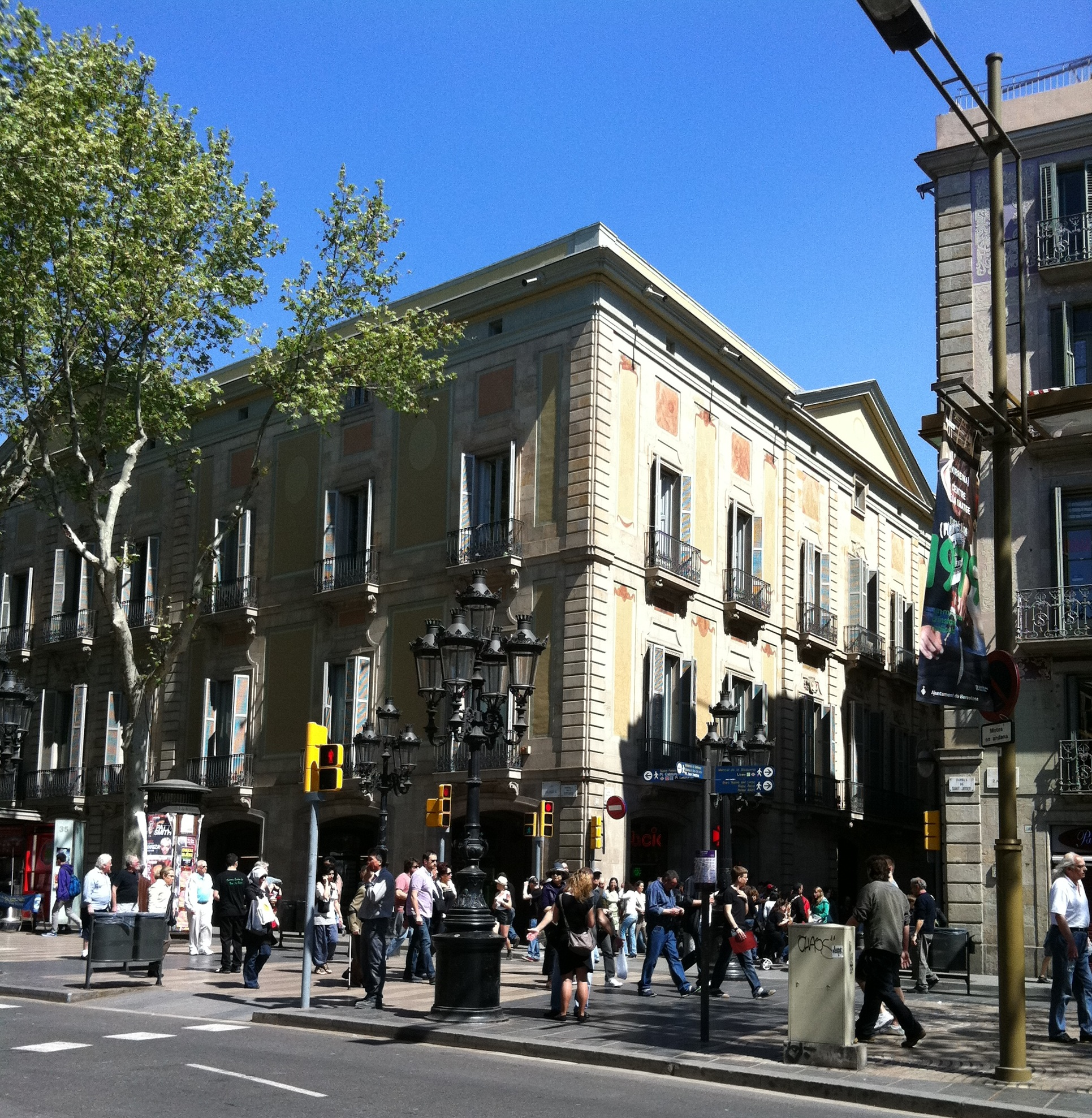 Vista general del Palau Moja